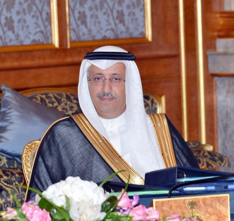 معالي الدكتور سعود المتحمي